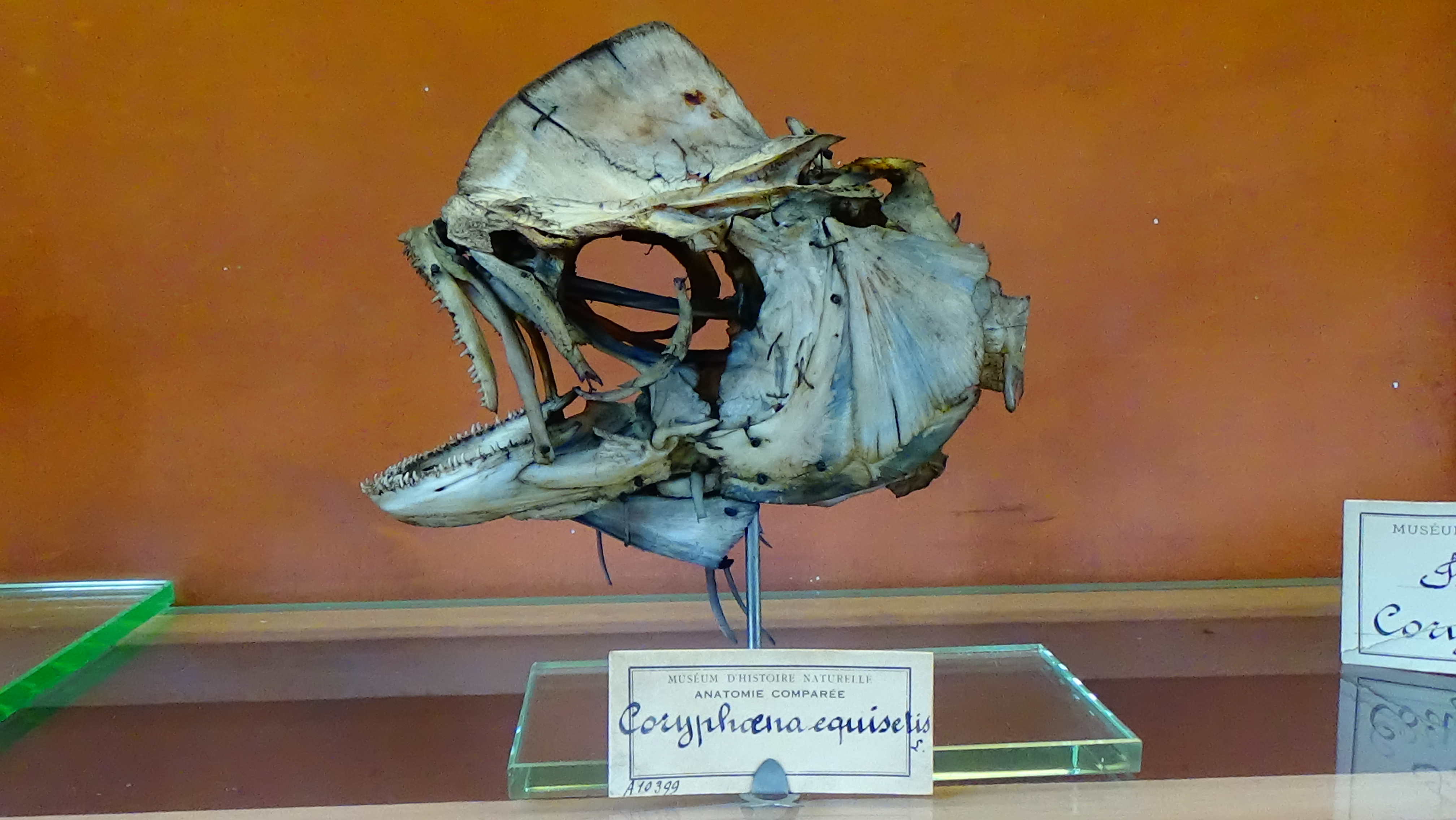 Coryphaena equiselis - tete squelette mnhn Paris